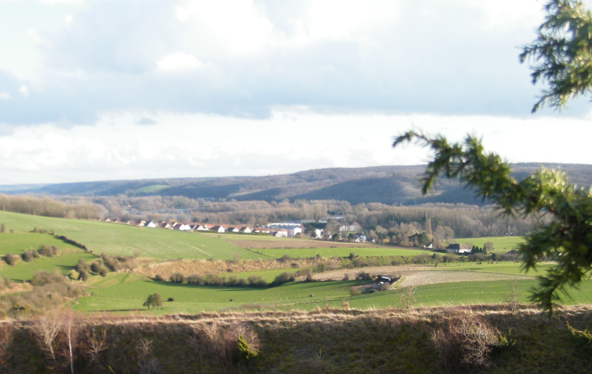 Le village dans la vallée de la Bresle.